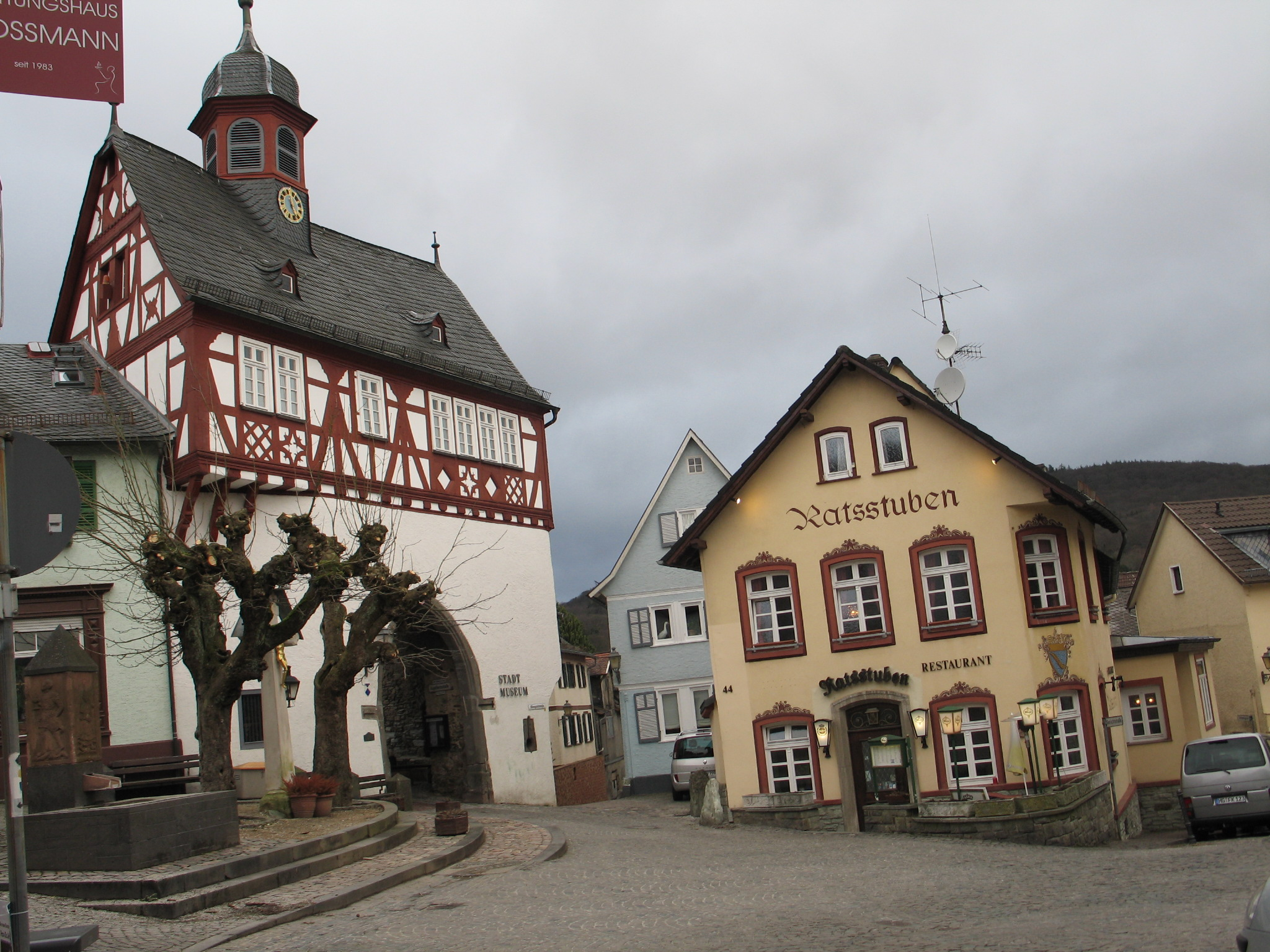 Konigstein downtown, vecchio municipio